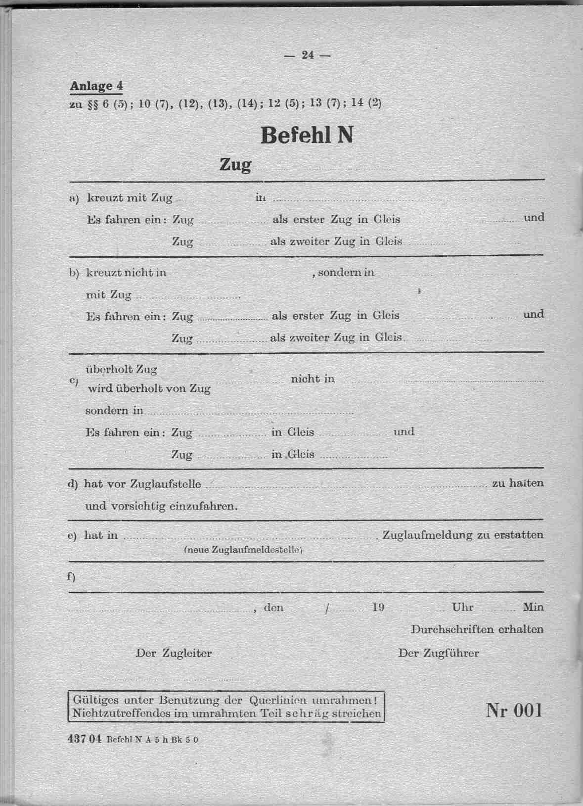 Befehl N bei der Deutschen Reichsbahn Vereinfachter Nebenbahnbetrieb